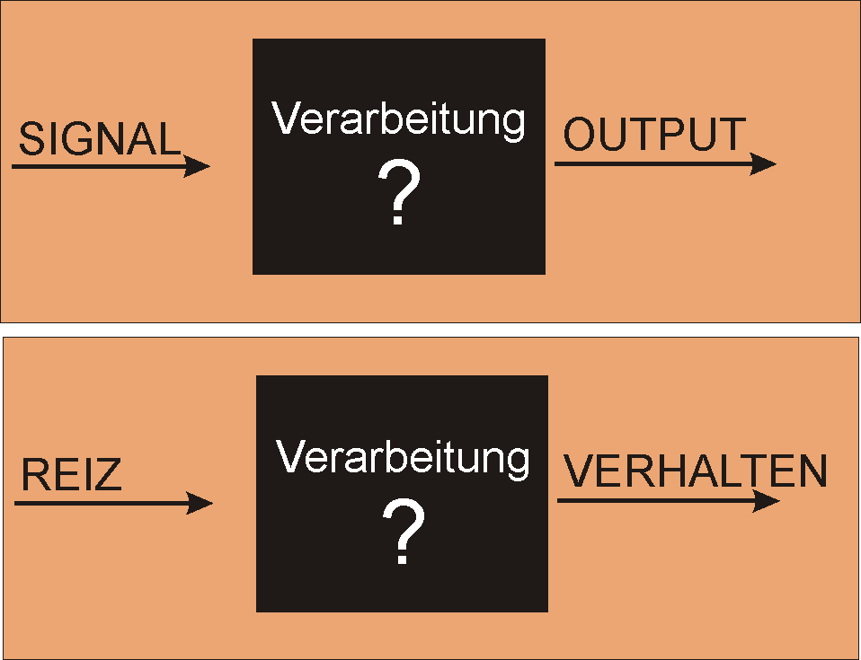 BlackBox